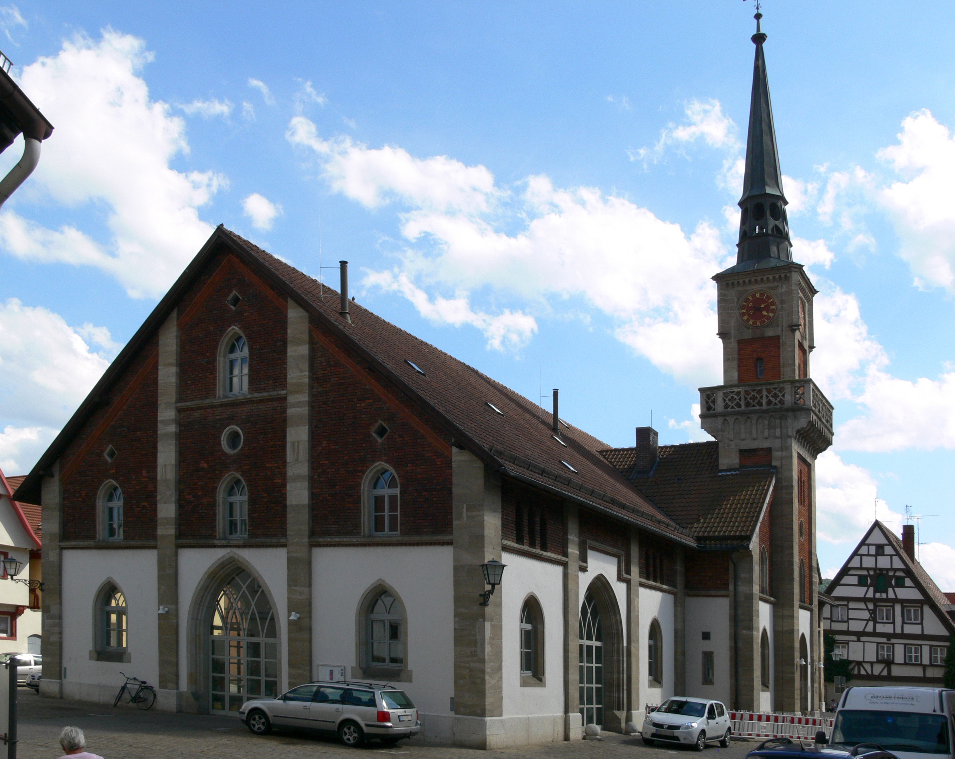 Denkmalgeschütztes Gebäude in Weißenburg (Bayern), SchranneThis is a photograph of an architectural monument., no. D-5-77-177-48